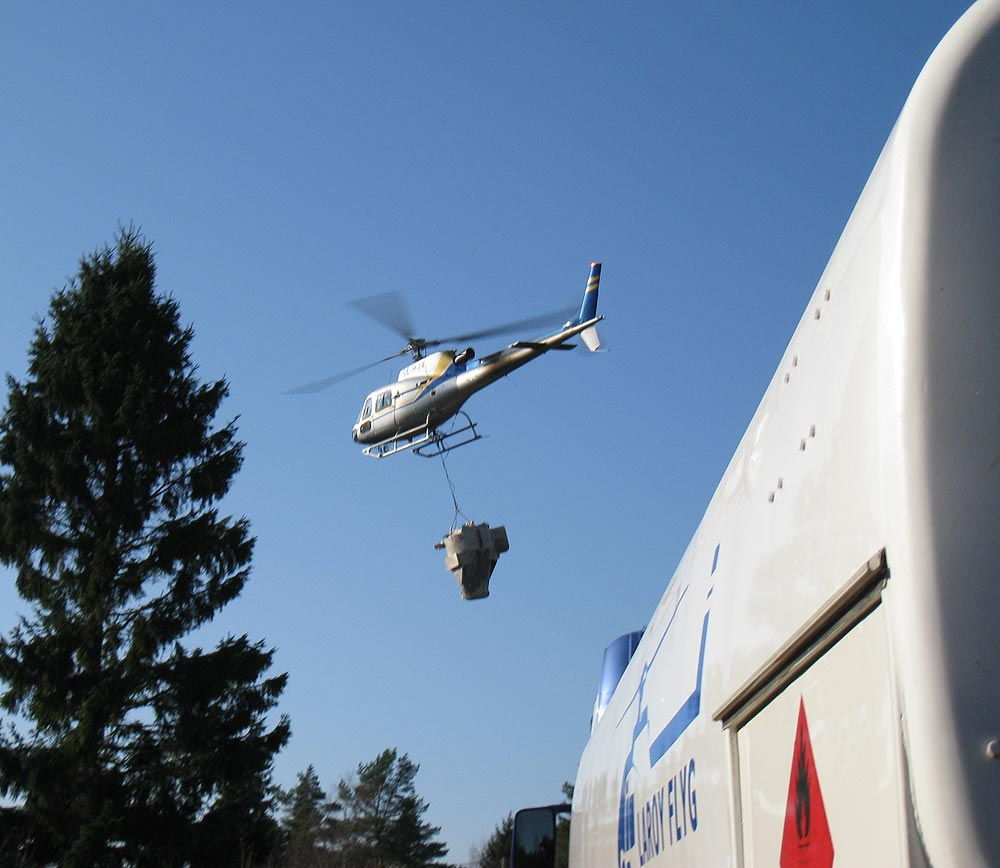 Skogskalkning i Kungsbacka kommun